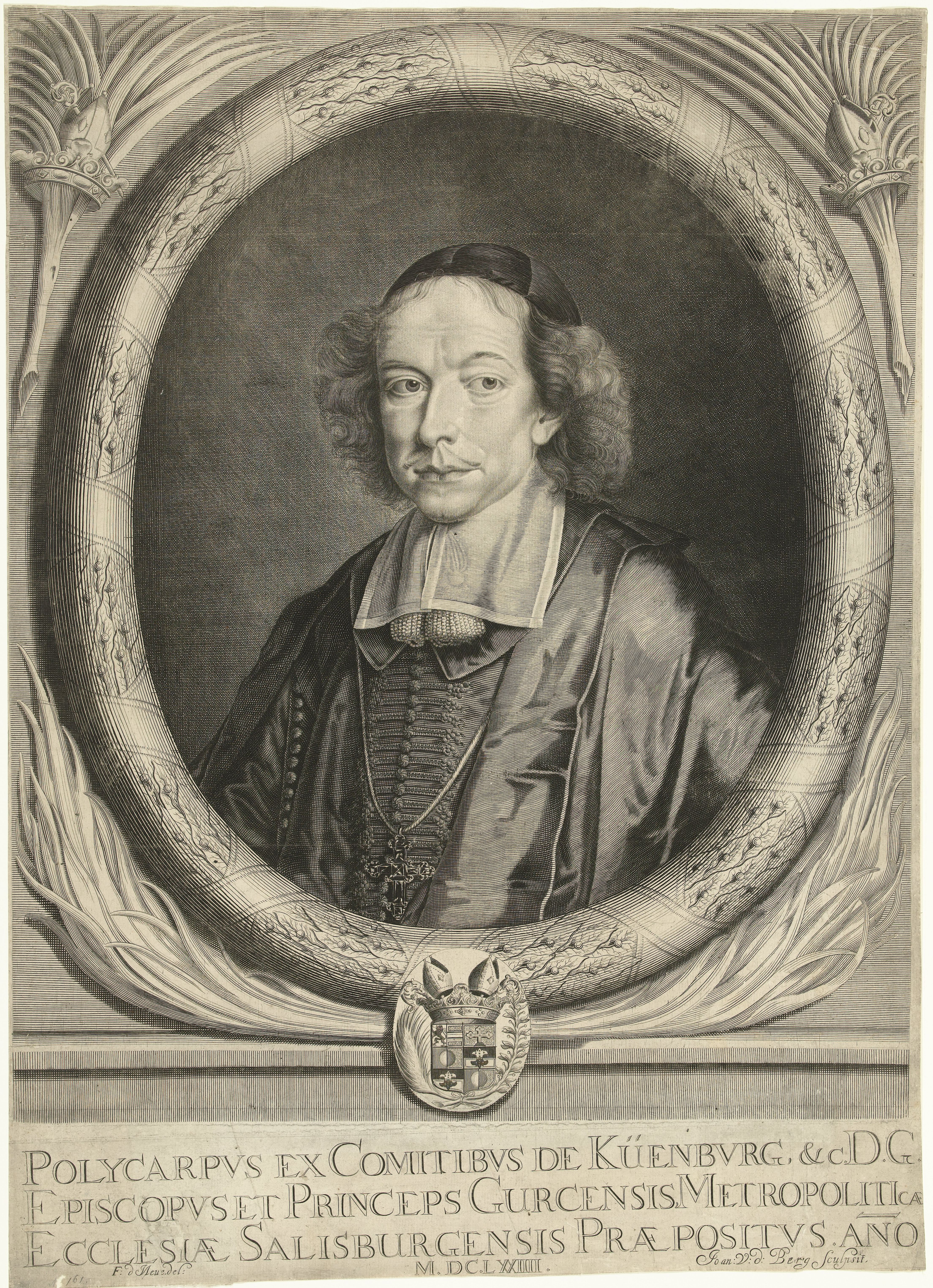 IdentificatieTitel(s): Portret van graaf Polycarpus van Kuenburg, bisschop van Gork en proost van SalzburgPolycarpvs ex Comitibvs (...) Ecclesiae Salisburgensis Praepositvs (titel op object)Objecttype: prent Objectnummer: RP-P-OB-67.463VervaardigingVervaardiger: prentmaker: Joannes van de Berg (vermeld op object)naar tekening van: Franciscus de Neve (vermeld op object)Datering: 1674Fysieke kenmerken: gravureMateriaal: papier Techniek: graveren (drukprocedé)Afmetingen: blad: h 852 mm × b 652 mmToelichtingPrent naar tekening van Franciscus de Neve.OnderwerpWat: archbishop, bishop, etc. (Roman Catholic)Wie: Polycarpus KuenburgVerwerving en rechtenVerwerving: onbekendCopyright: Publiek domein